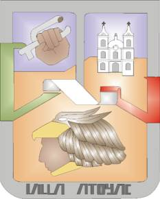 Stemma Atoyac - Jalisco